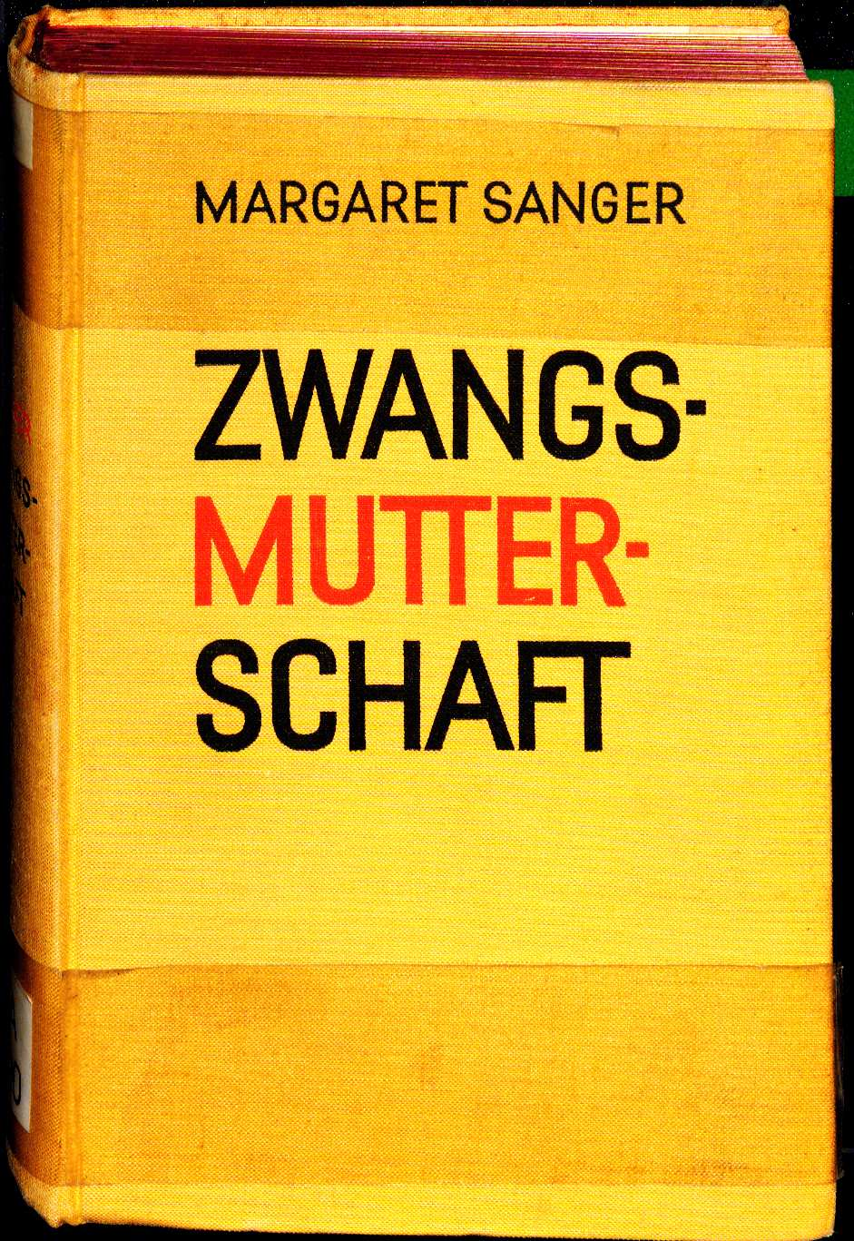 Margaret Sanger Zwangs-Mutterschaft 1929 Einband